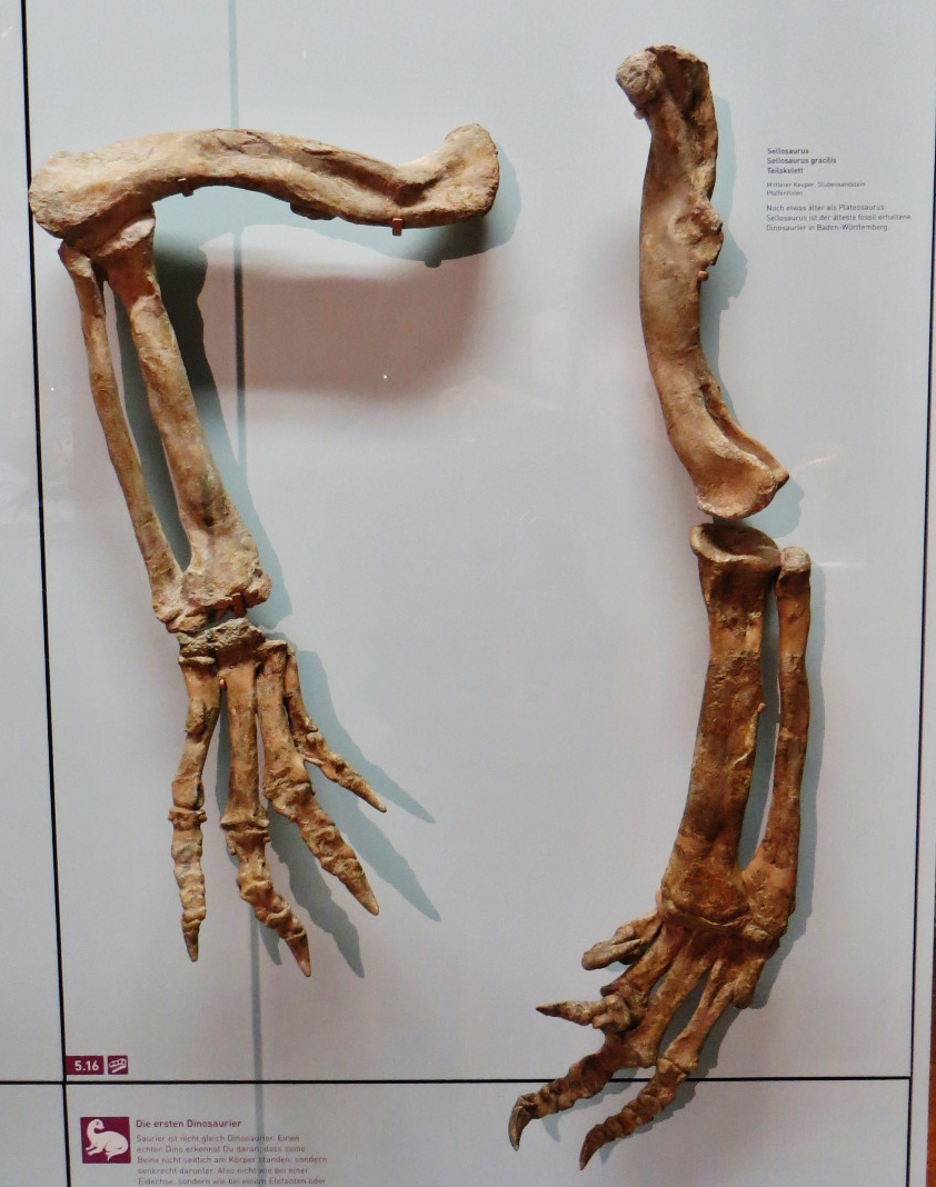 Fossil of Sellosaurus - Took the picture at Museum am Lowentor, Stuttgart